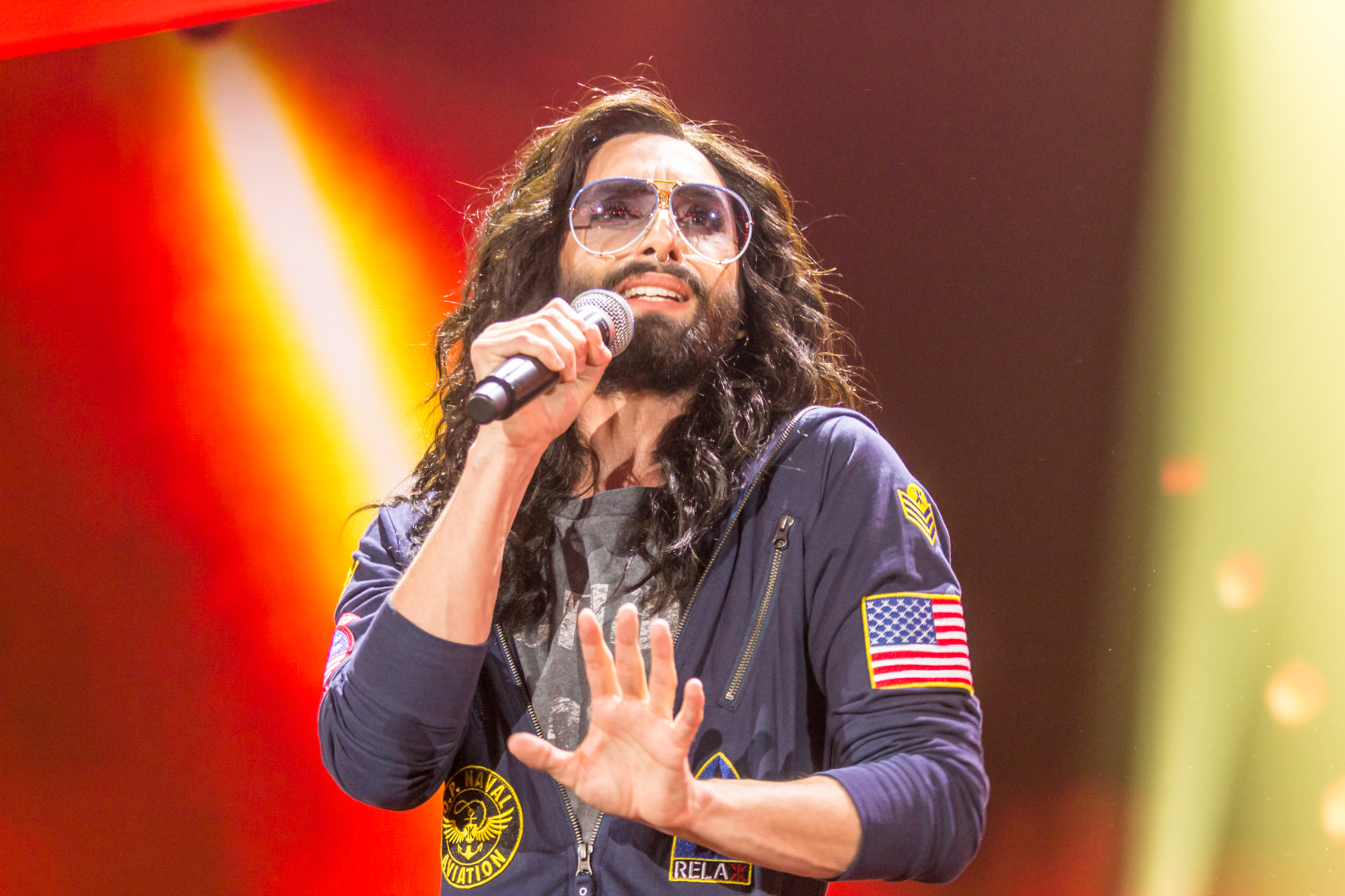 Unser Song 2017 - Generalprobe - Medley Ruslana, Nicole und Conchita